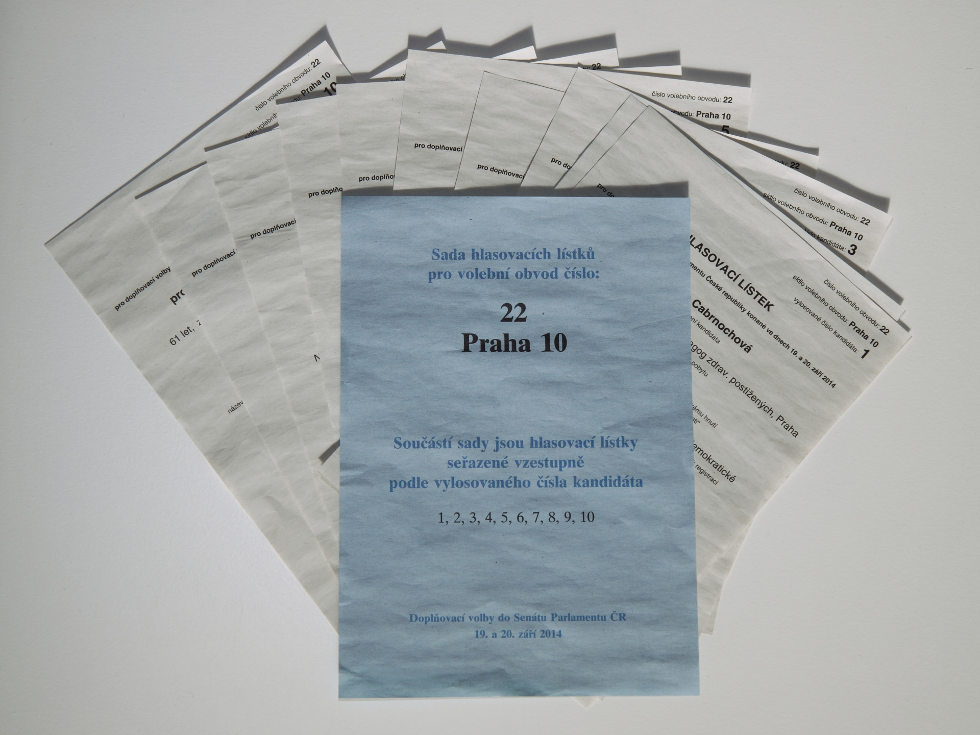 Hlasovací lístky do prvního kola doplňovacích voleb do Senátu Parlamentu ČR ve volebním obvodu č. 22 – Praha 10, konaných 19.–20. září 2014